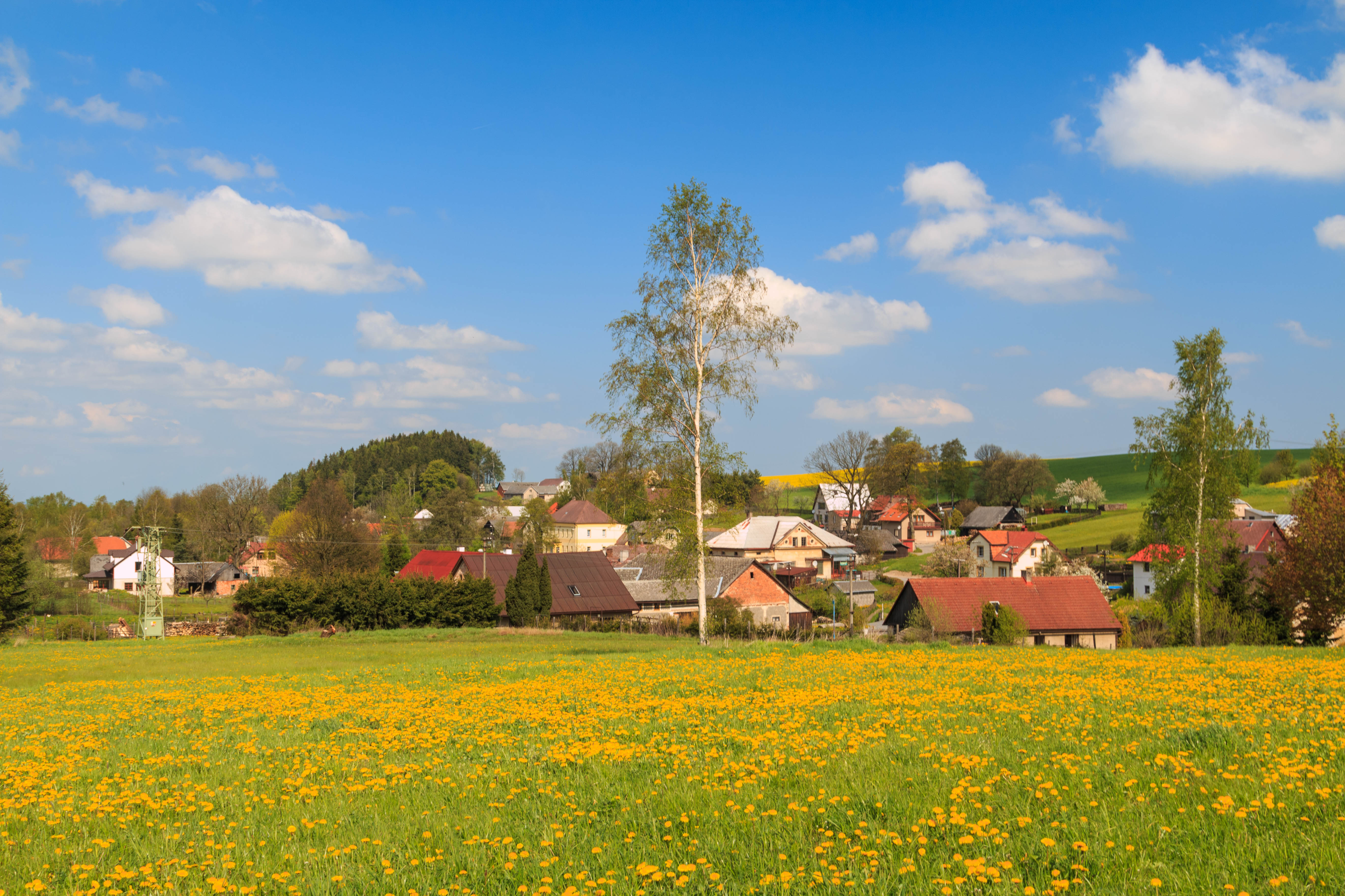 Pustá Kamenice kravín pod kostelem